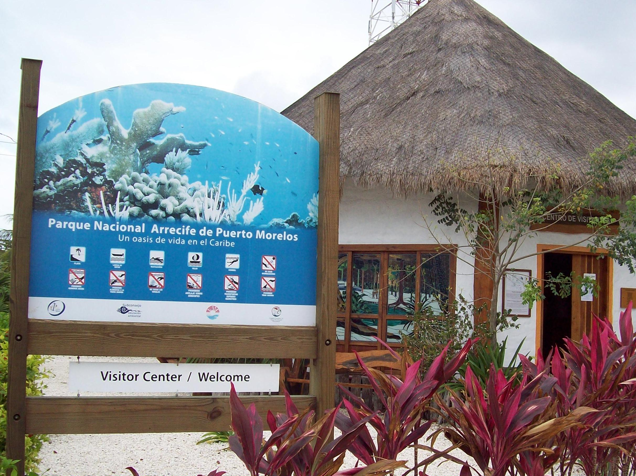 Vista exterior del centro de visitantes del Parque Nacional Arrecife de Puerto Morelos